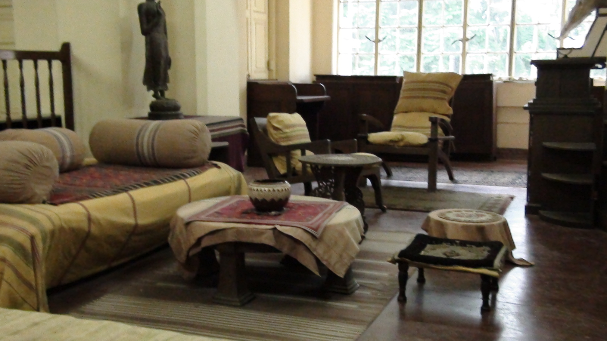 சாந்தி நிகேதனில் மகாகவி தாகூர் தங்கியிருந்த அறை